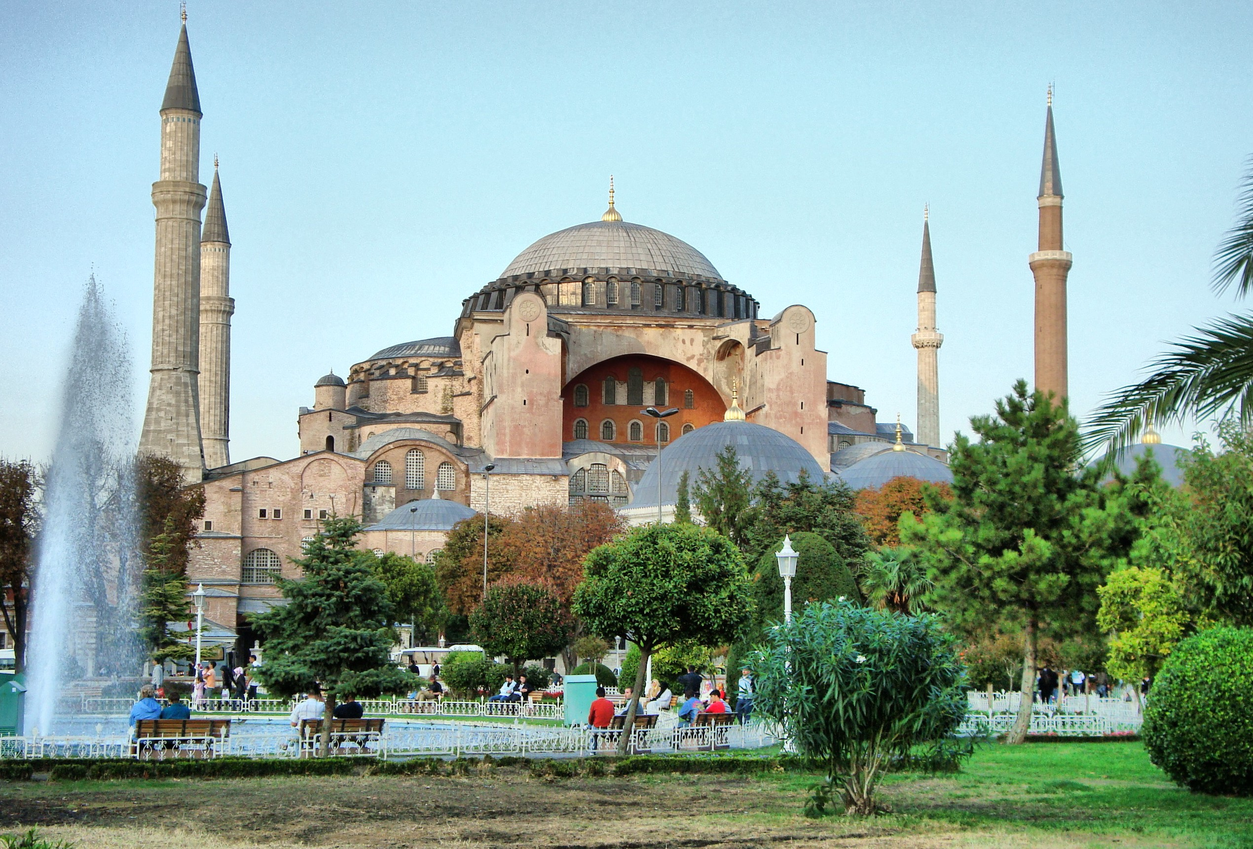 AYASOFYA